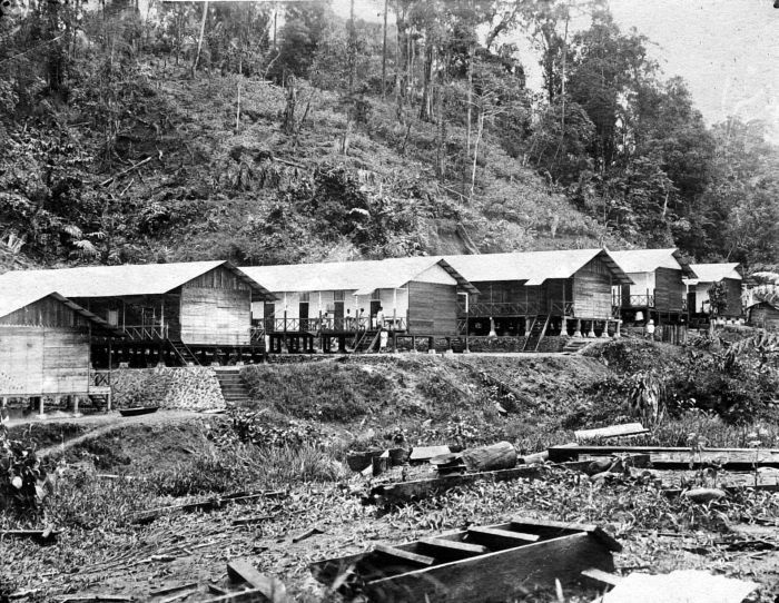 Repronegatief. Woonbarakken voor de arbeiders die de goud- en zilvermijn Tambang Sawah ontginnen